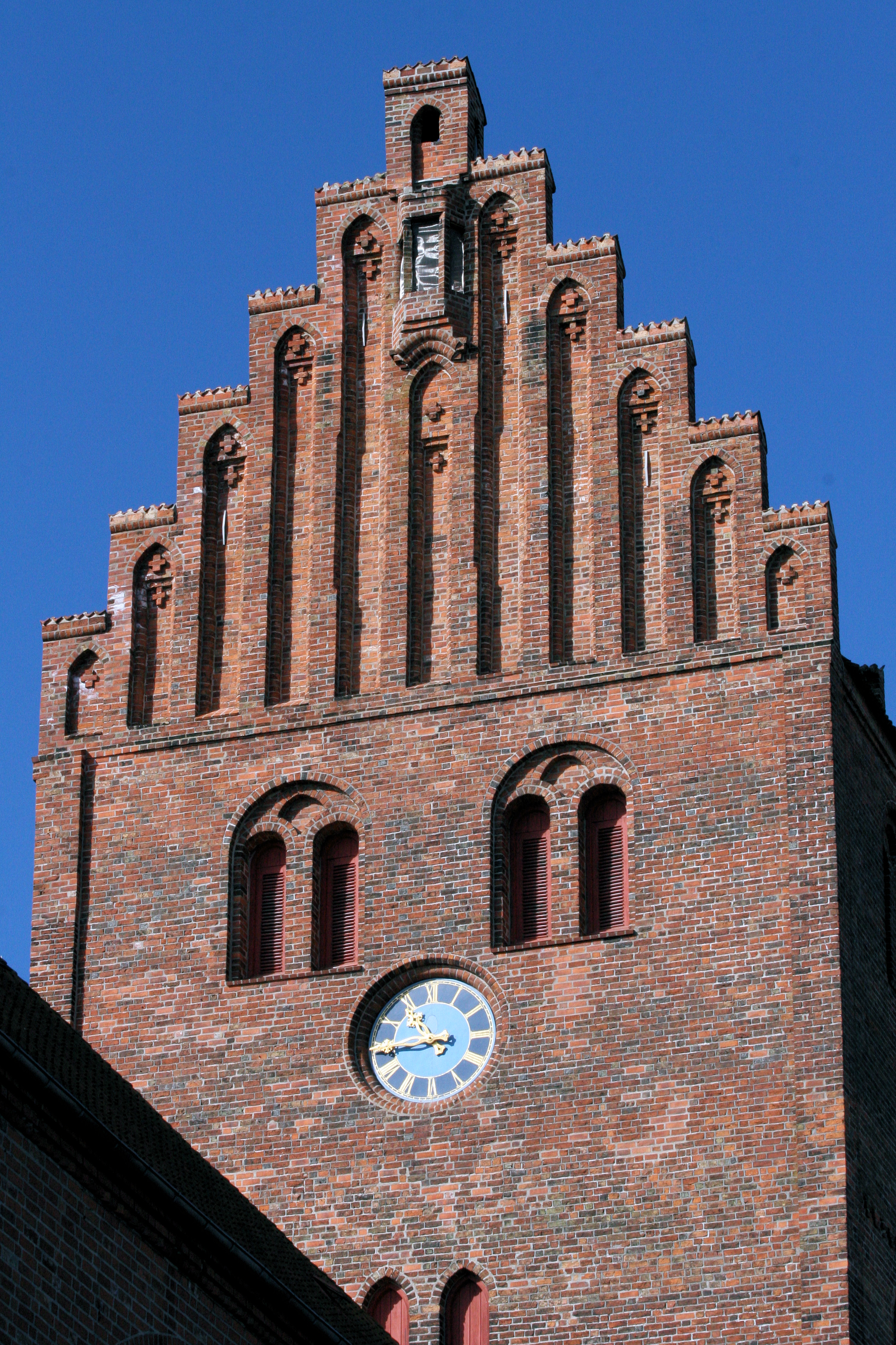 Sankt Nicolai Kirke, Køge, Denmark (Køge Kirke). Belfry from east.